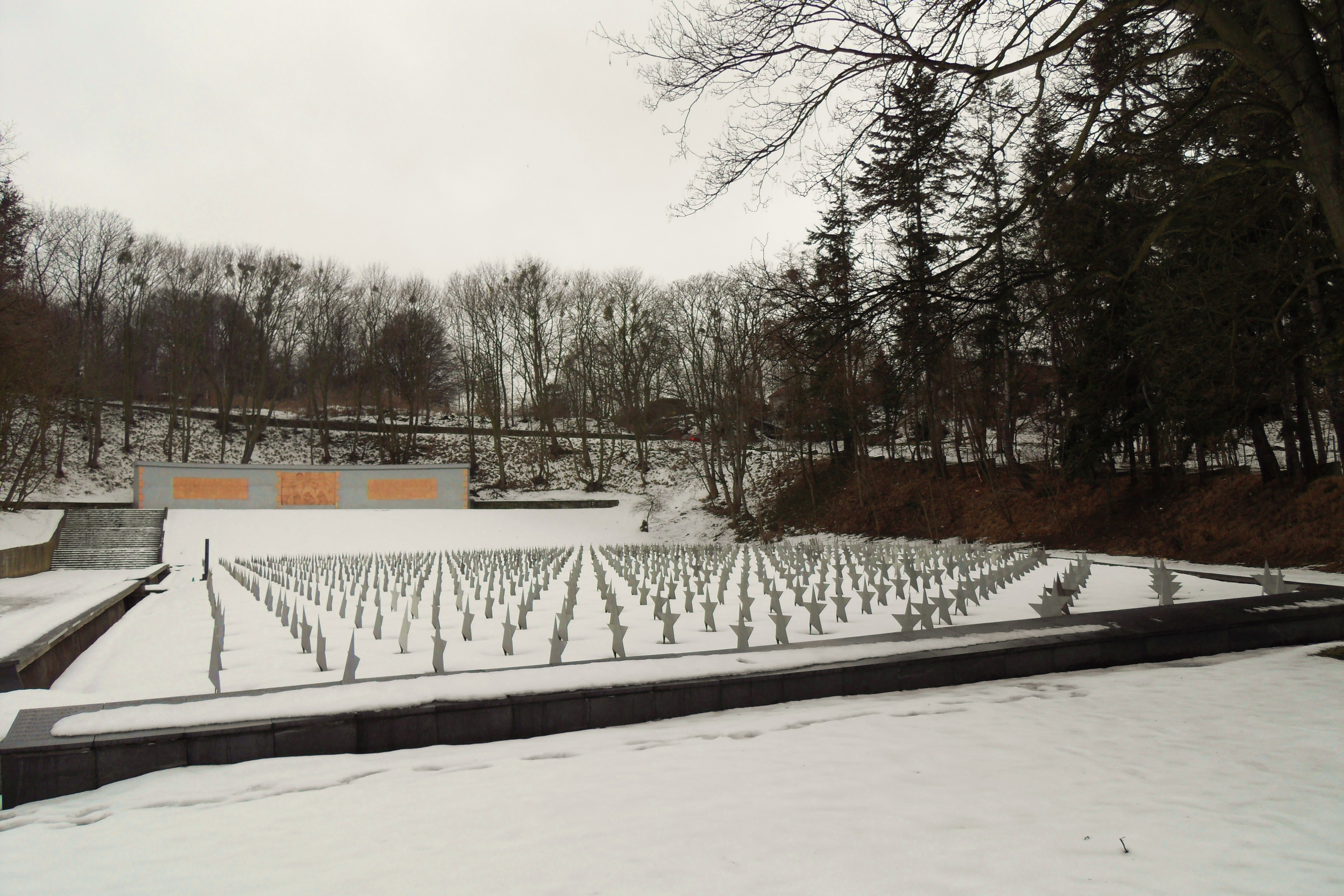 Gdańsk. Cmentarz Żołnierzy Radzieckich.